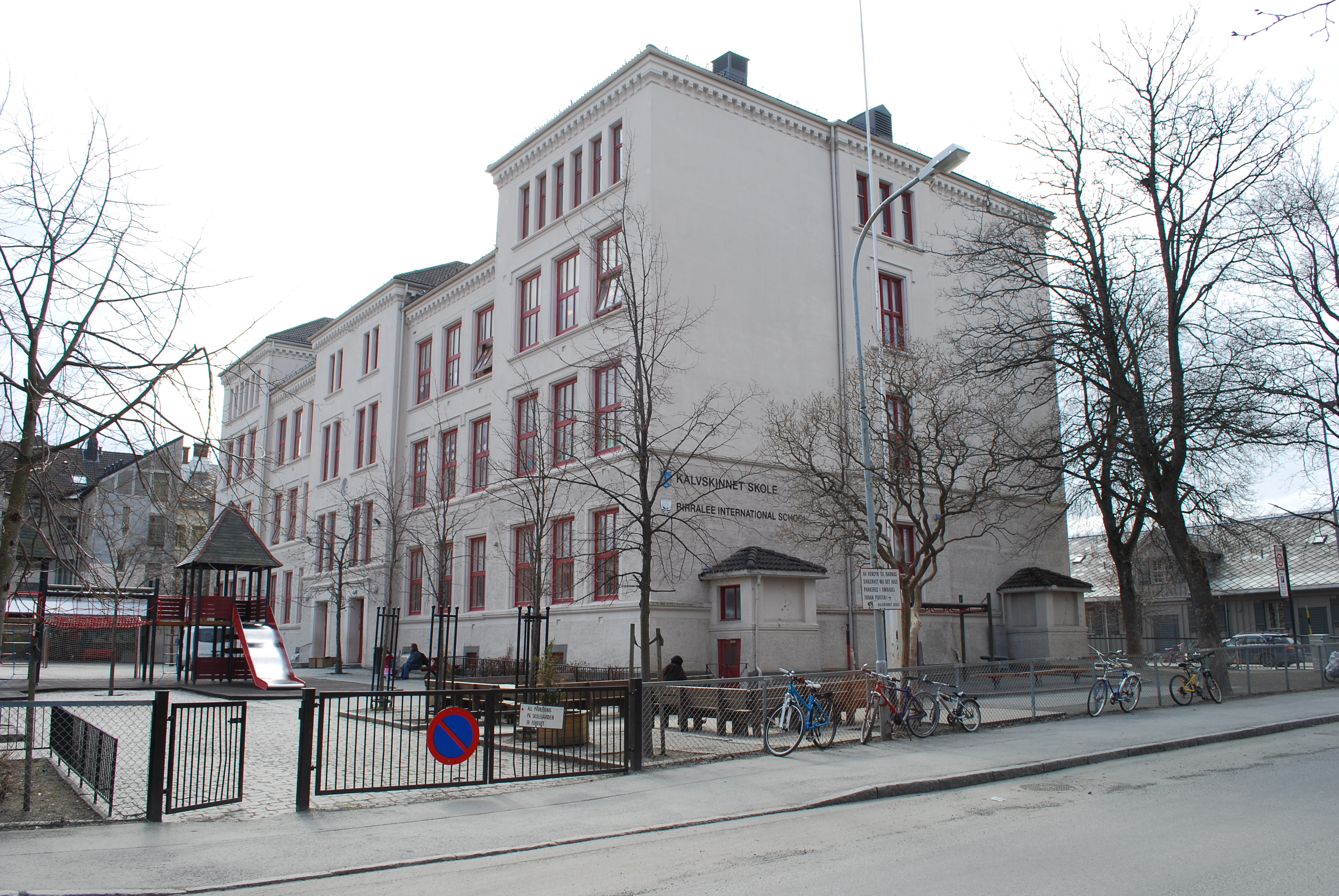 Birralee International School ved Kalvskinnet i Trondheim